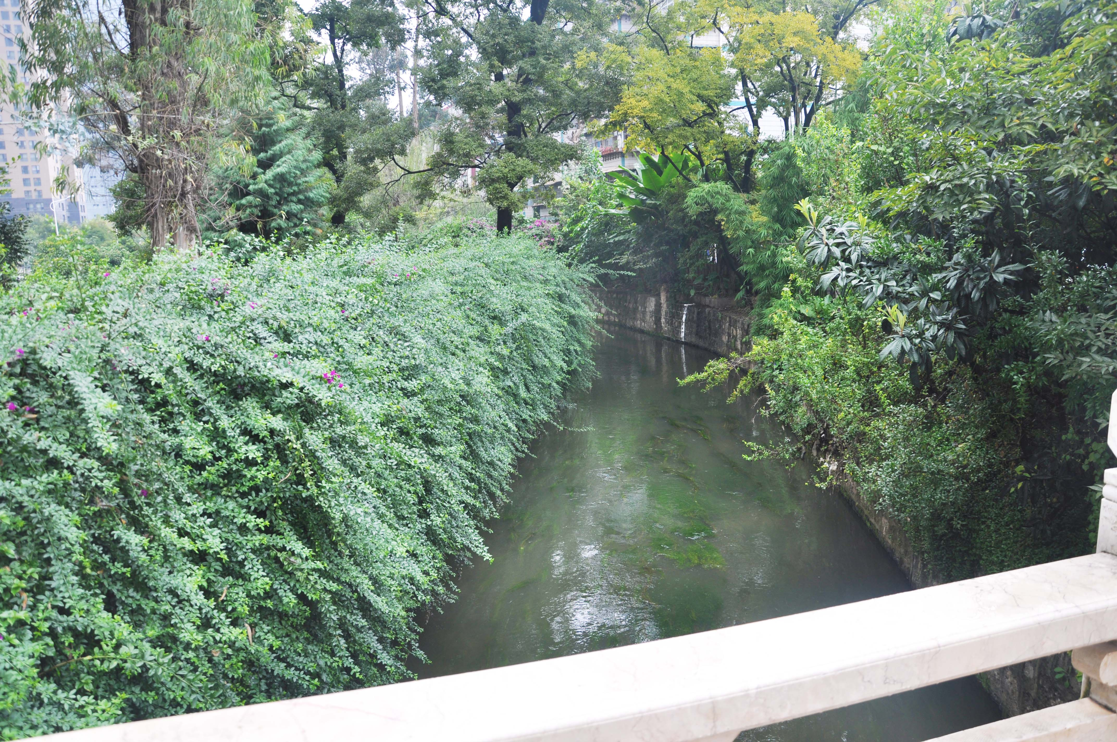 昆明昙华寺附近的金汁河。